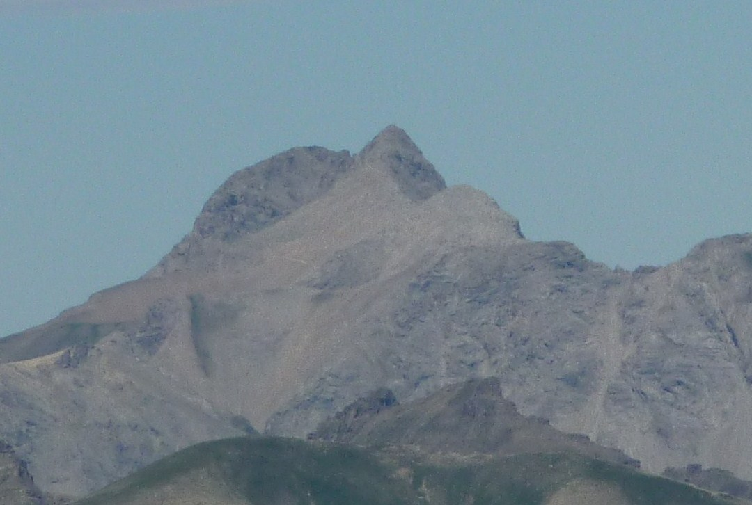 Photo du mont Pelat (3050m) dans le département des Alpes de Haute Provence (04) prise du Sud-Est à près de 29 km à vol d'oiseau du sommet (2011m) de l'Adrech de Forche ou Dreccia dans le domaine de la station de Valberg.